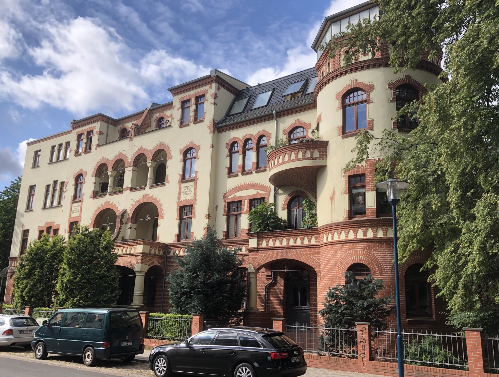 Bleckenburgstraße 2 bis 4